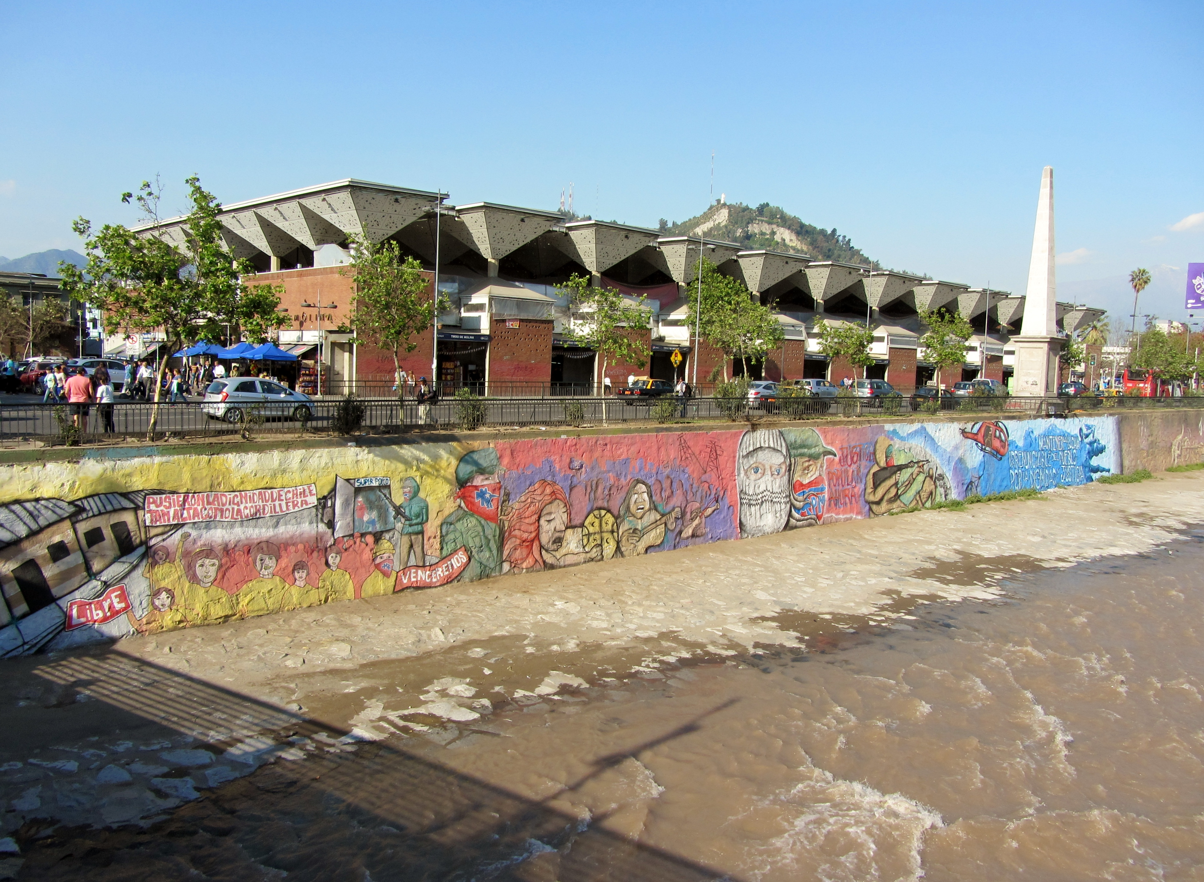 Murales pintados en homenaje al Frente Patriótico Manuel Rodríguez en la ribera norte del río Mapocho, a la altura del mercado de abastos Tirso de Molina, entre el puente de la Paz y el de Los Carros (peatonal).